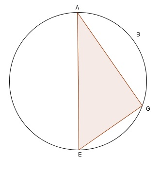 Il·lustració d'una de les proposiciones de les Data d'Euclides